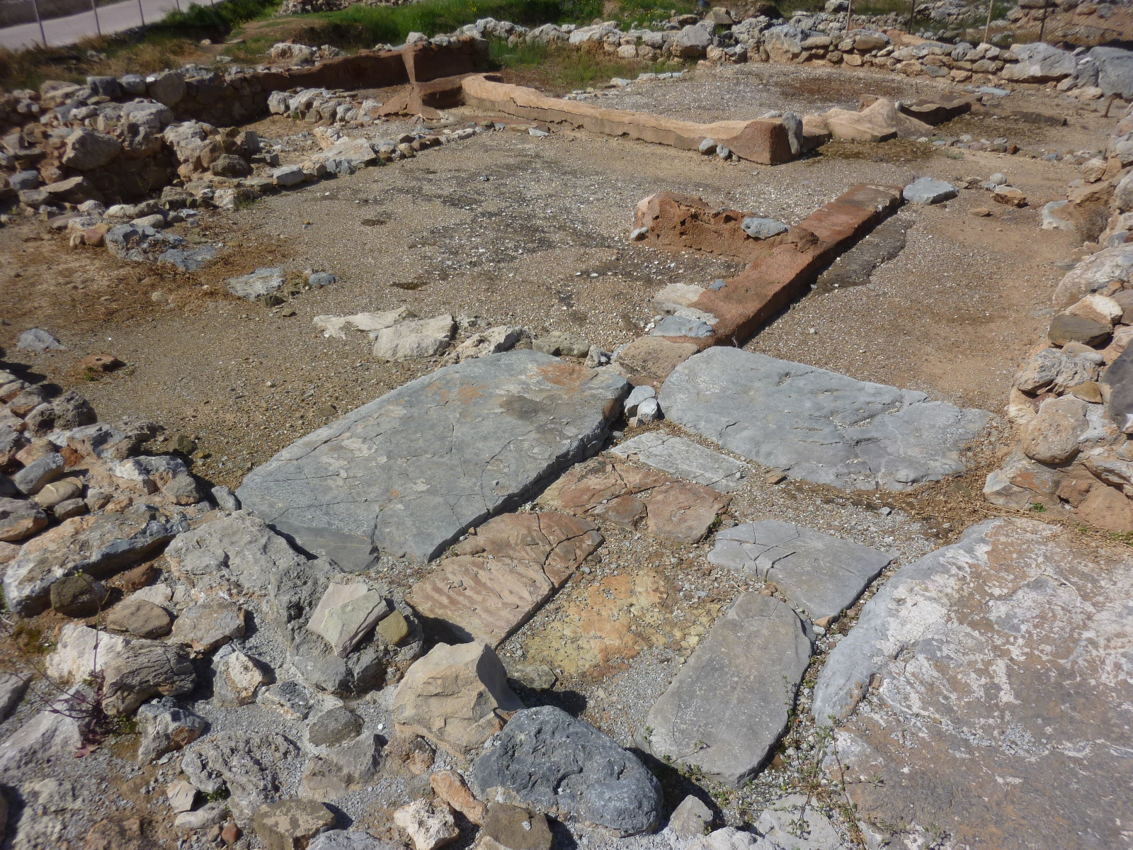 Ruines de Zakros, Crète, ateliers de l'aile sud-ouest